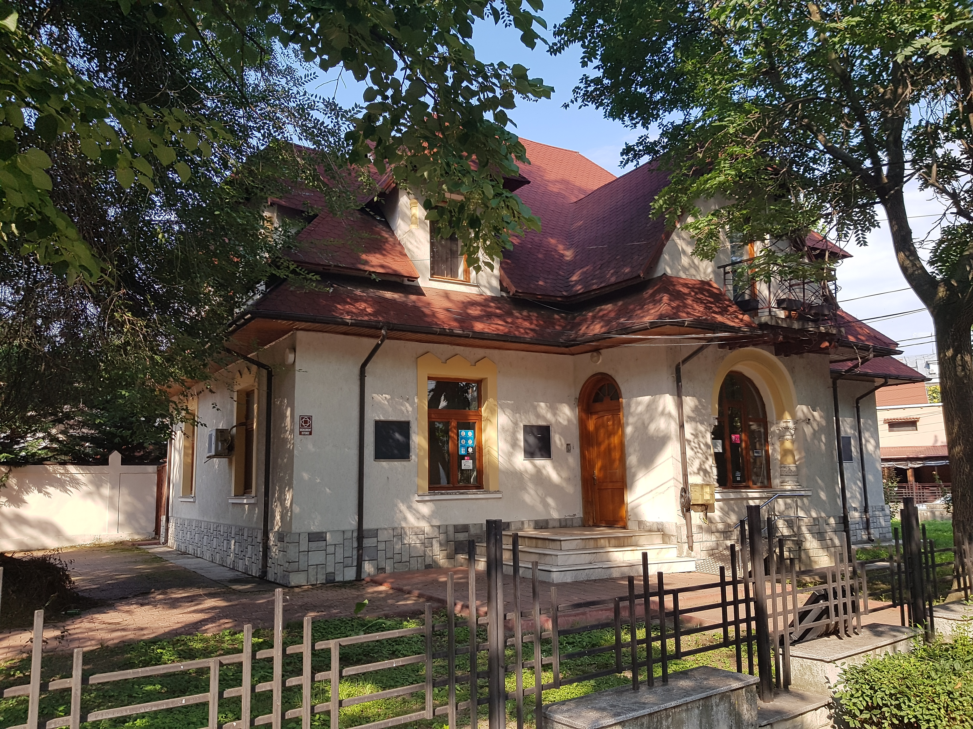 Casa Cristache Solomon